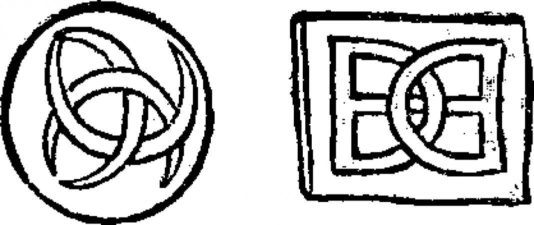 Oiron Potter's mark